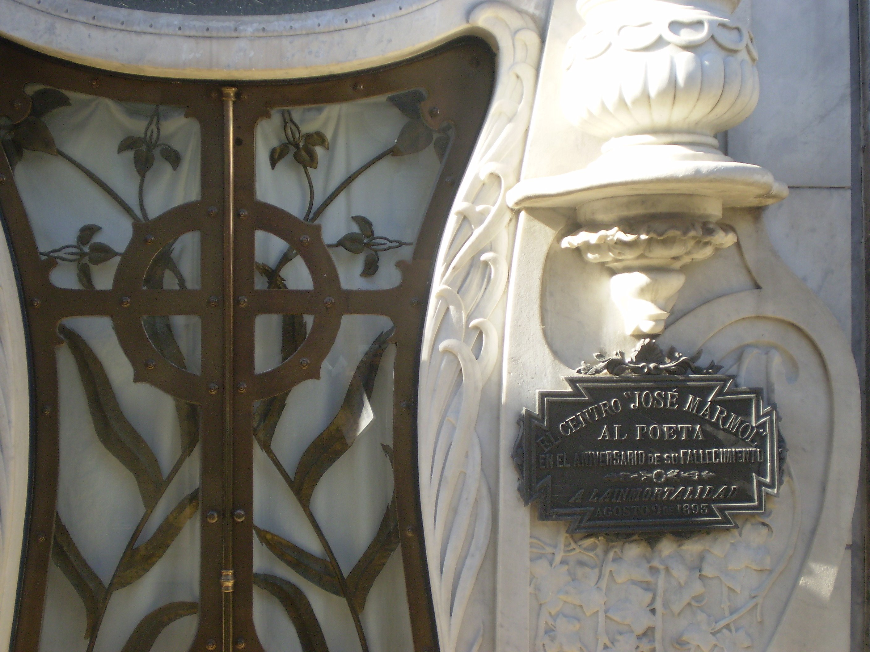 Detalle de la bóveda de José Mármol en el cementerio de la Recolete. Buenos Aires. (muestra del Art Nouveau)